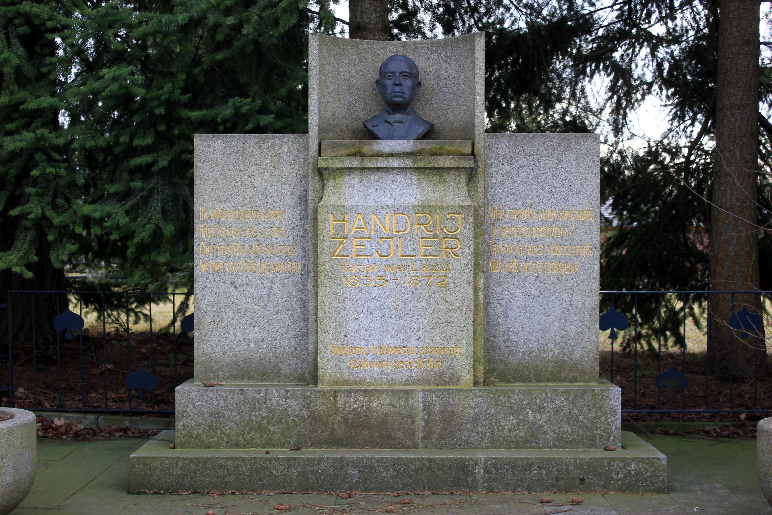 Hornjoserbsce: Pomnik Handrijej Zejlerjej we Łazu.